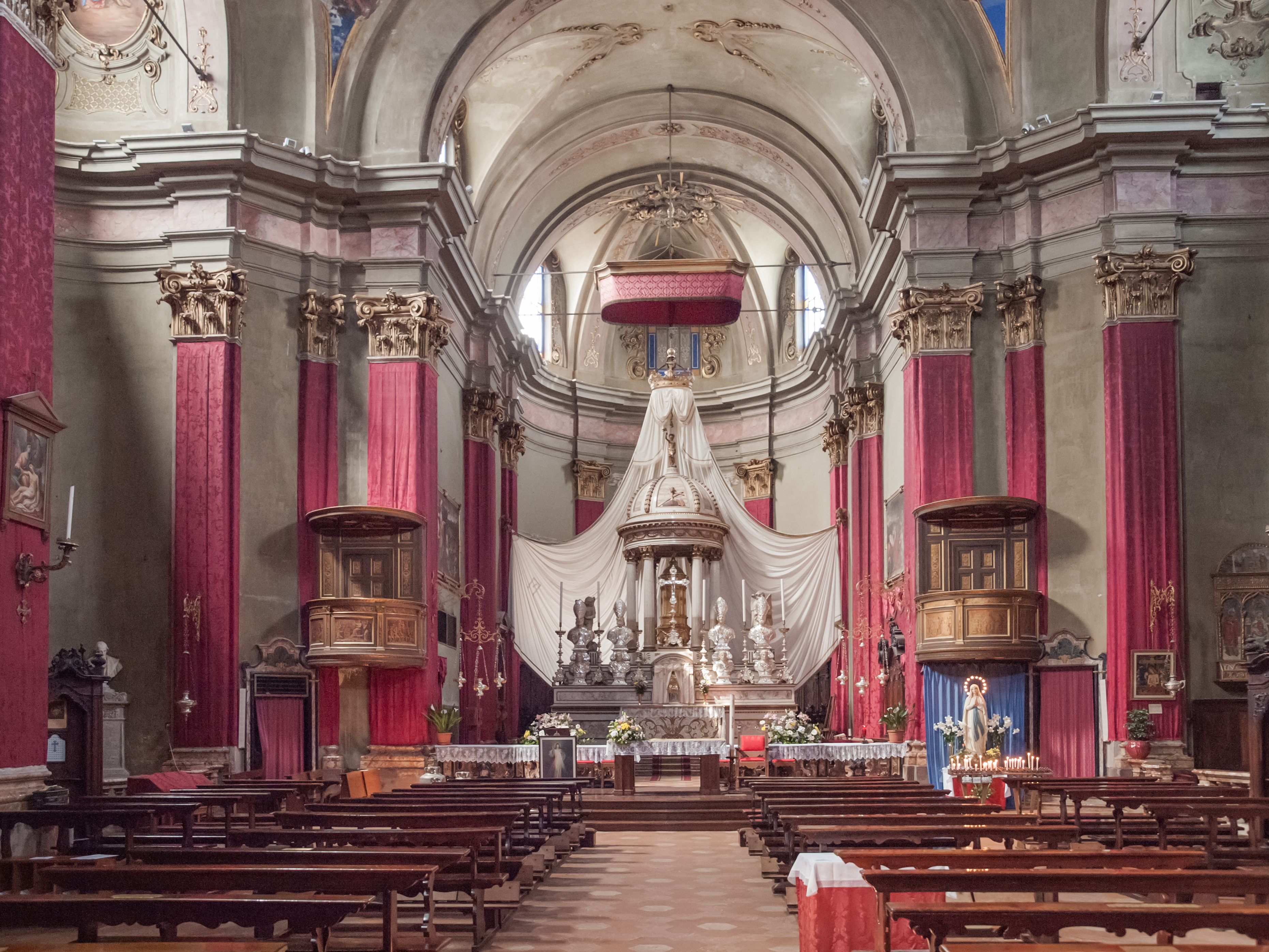 Collegiata di San Vittore, Cannobio, Italy